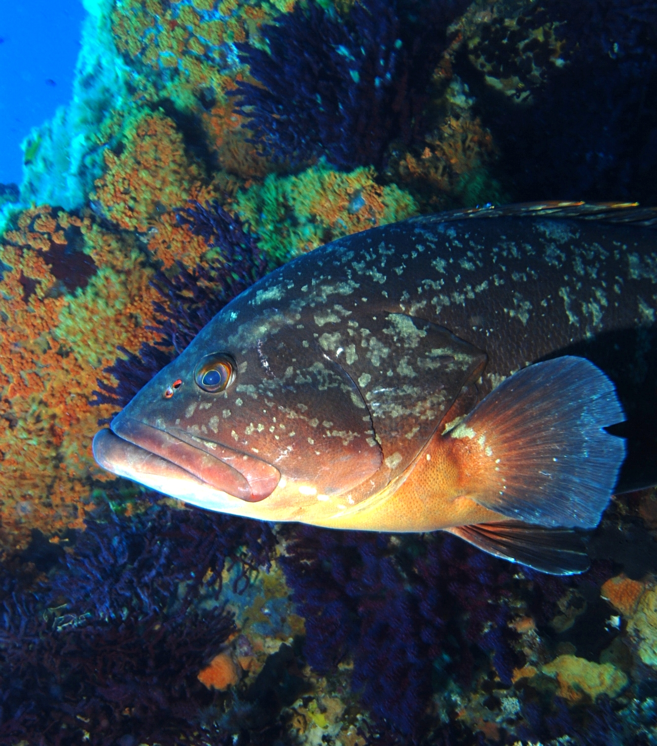 Merou5